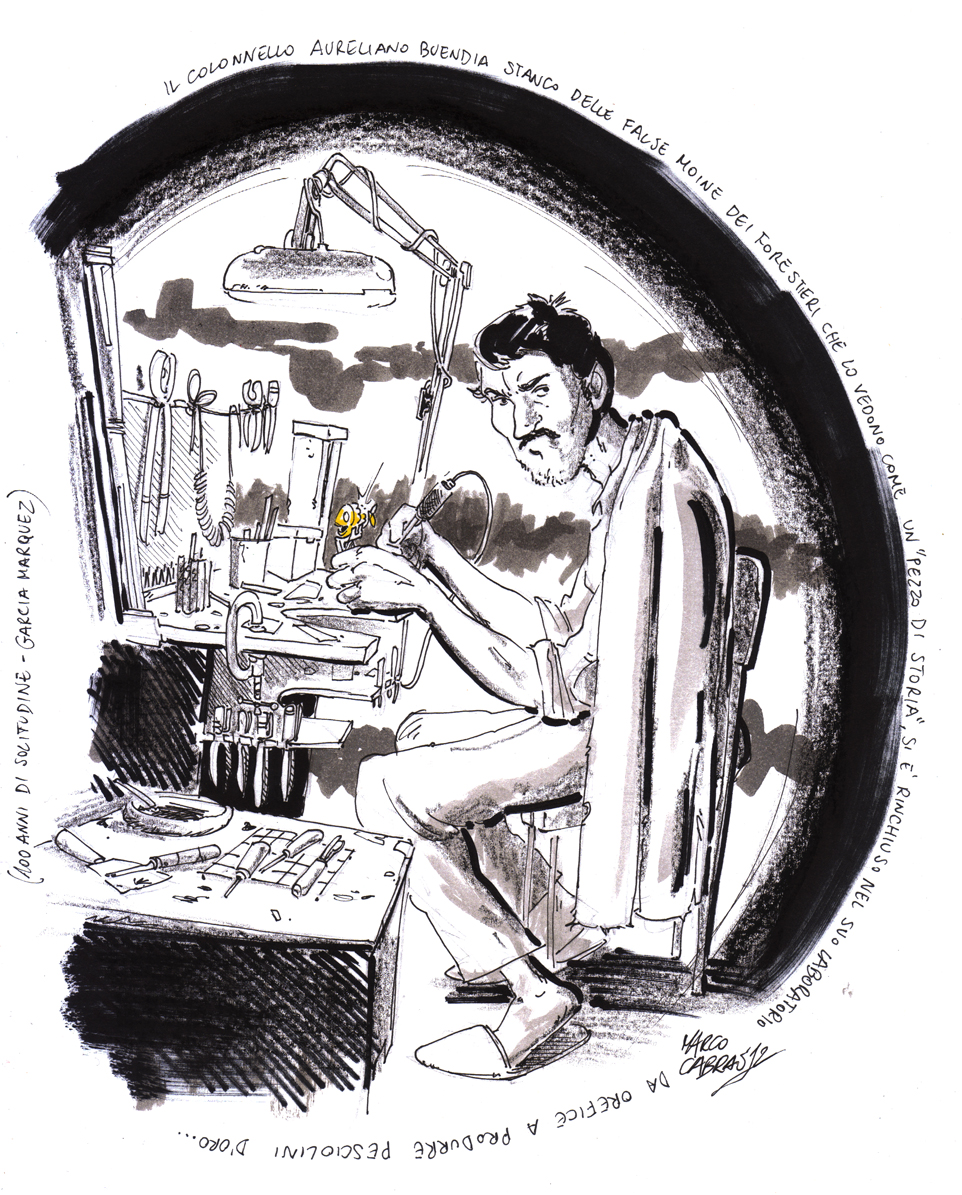 Illustrazione artistica del colonnello Aureliano Buendia